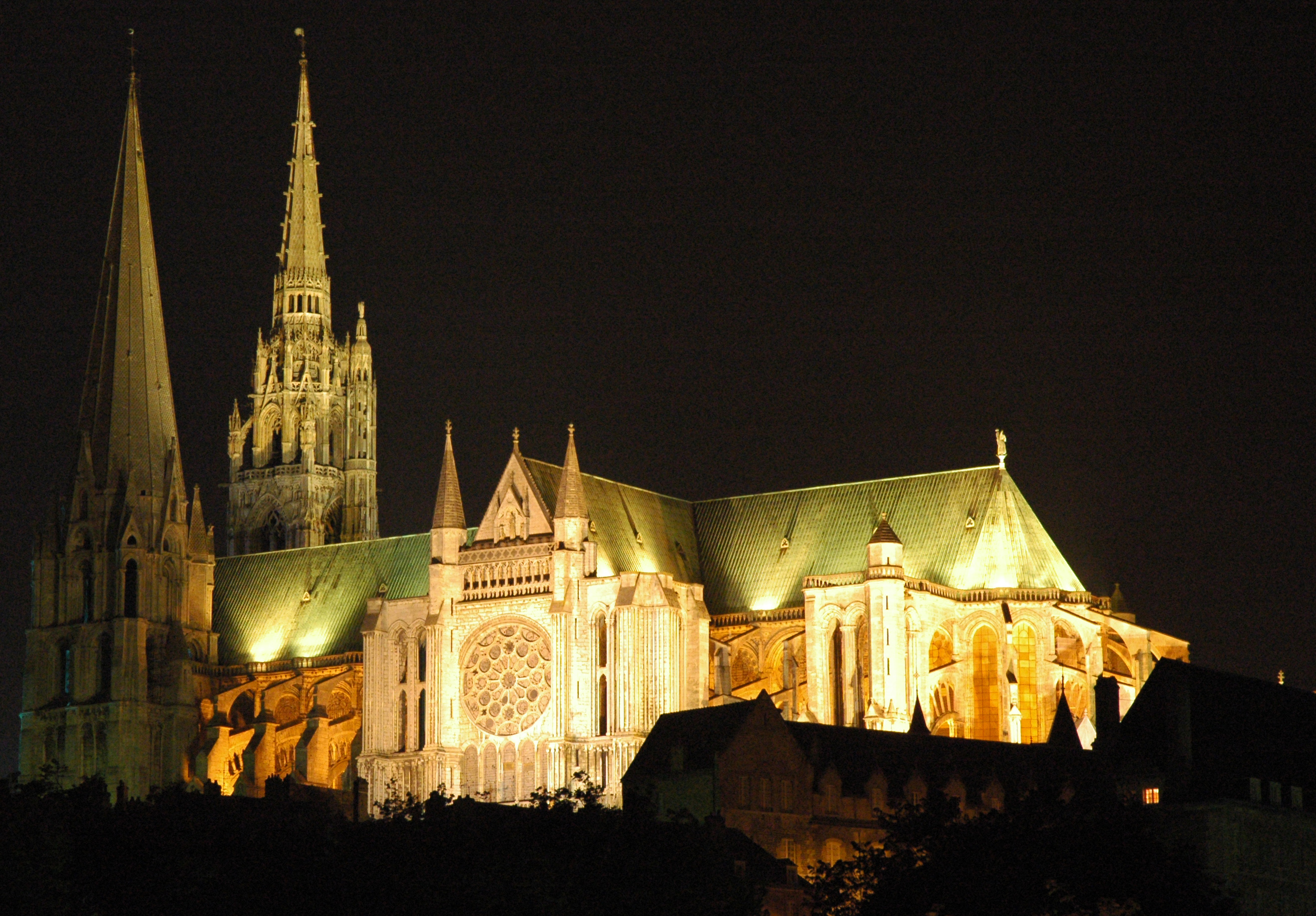 France Eure-et-Loir Chartres Cathédrale vue nocturne Photographie prise par GIRAUD Patrick